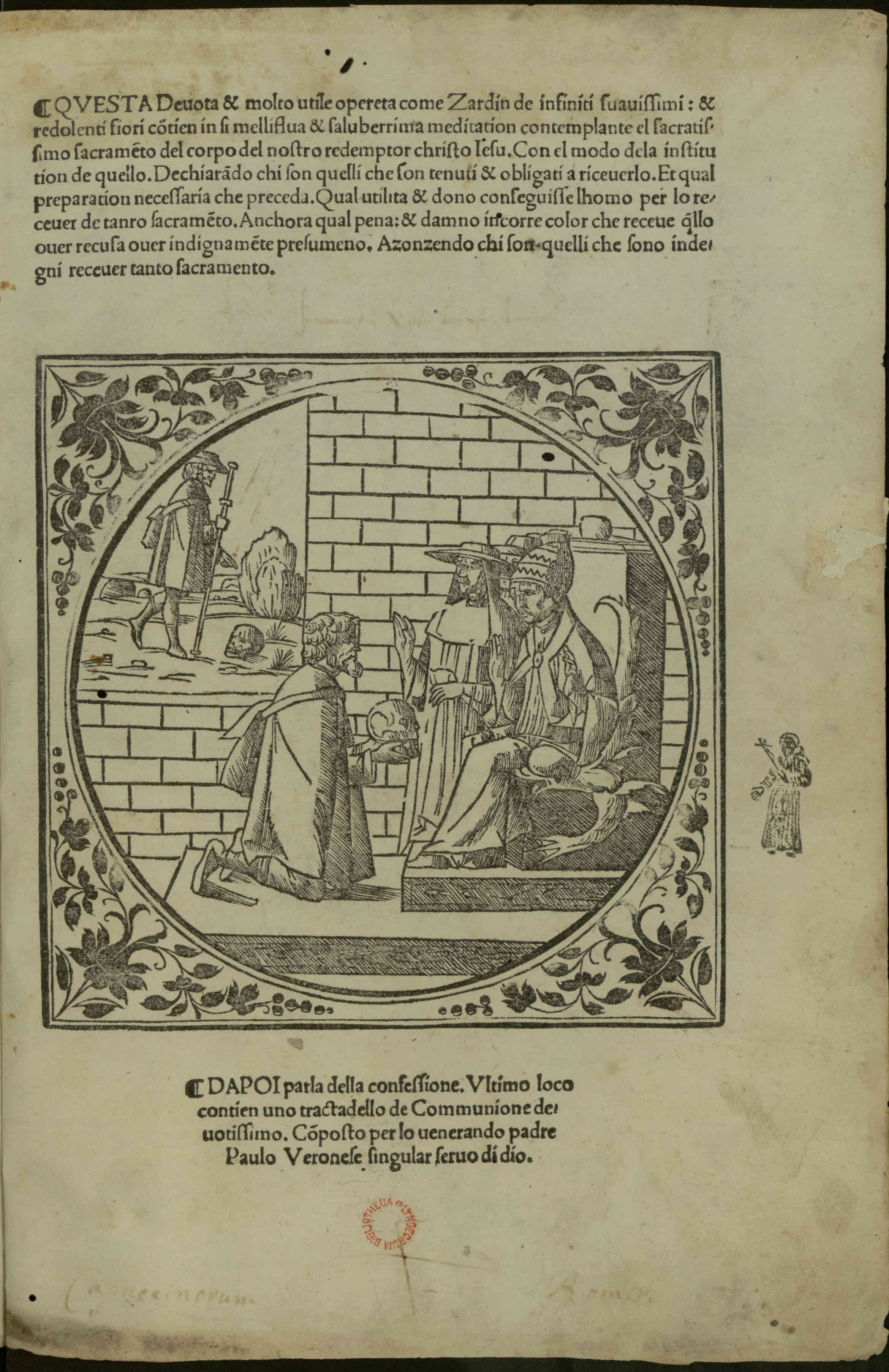 Incipit